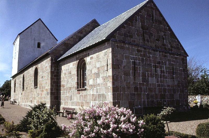 Torslev Kirke (Jammerbugt Kommune) i Danmark. Torslev kirke (Øster Han hr.)